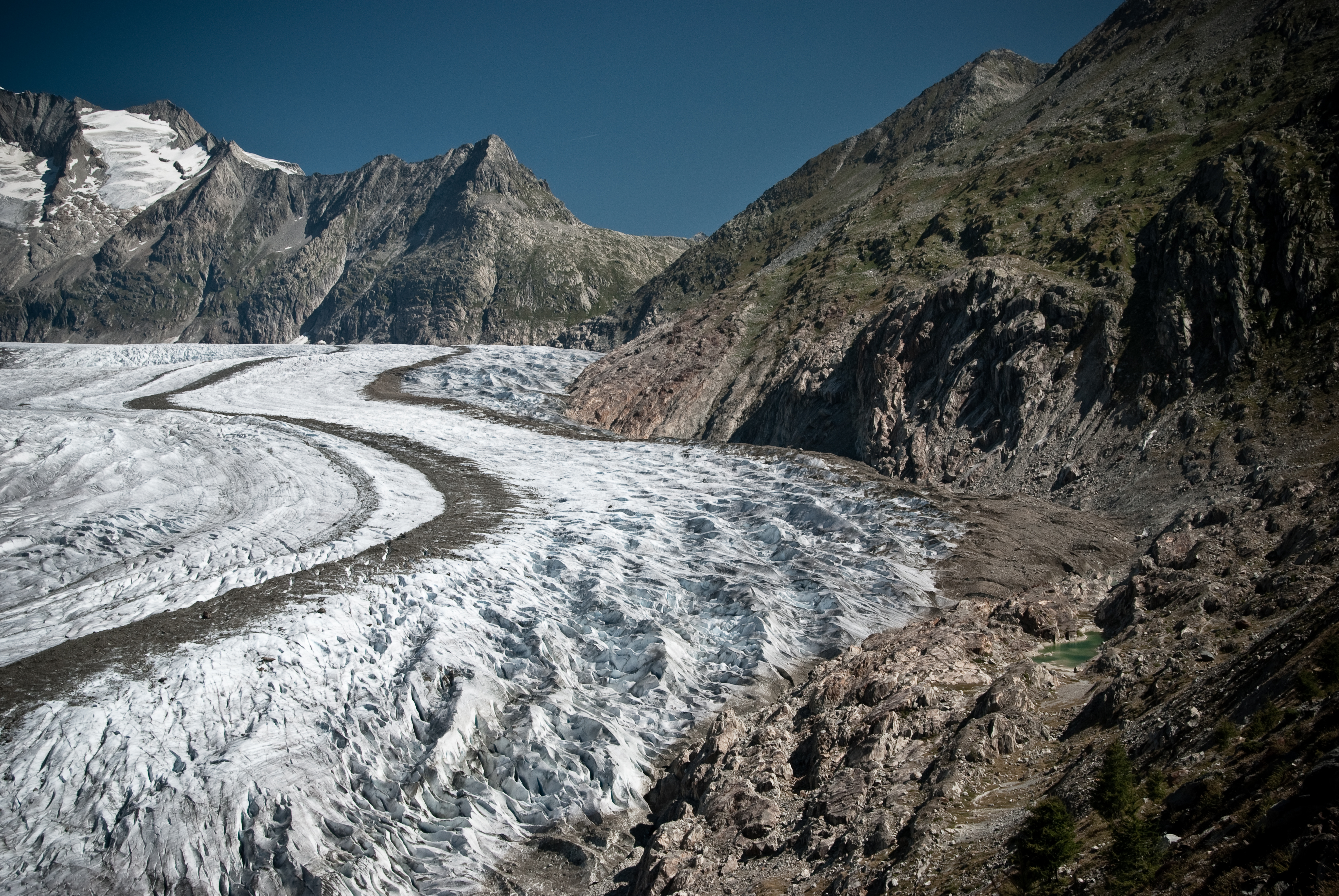 Aletsch Glacier